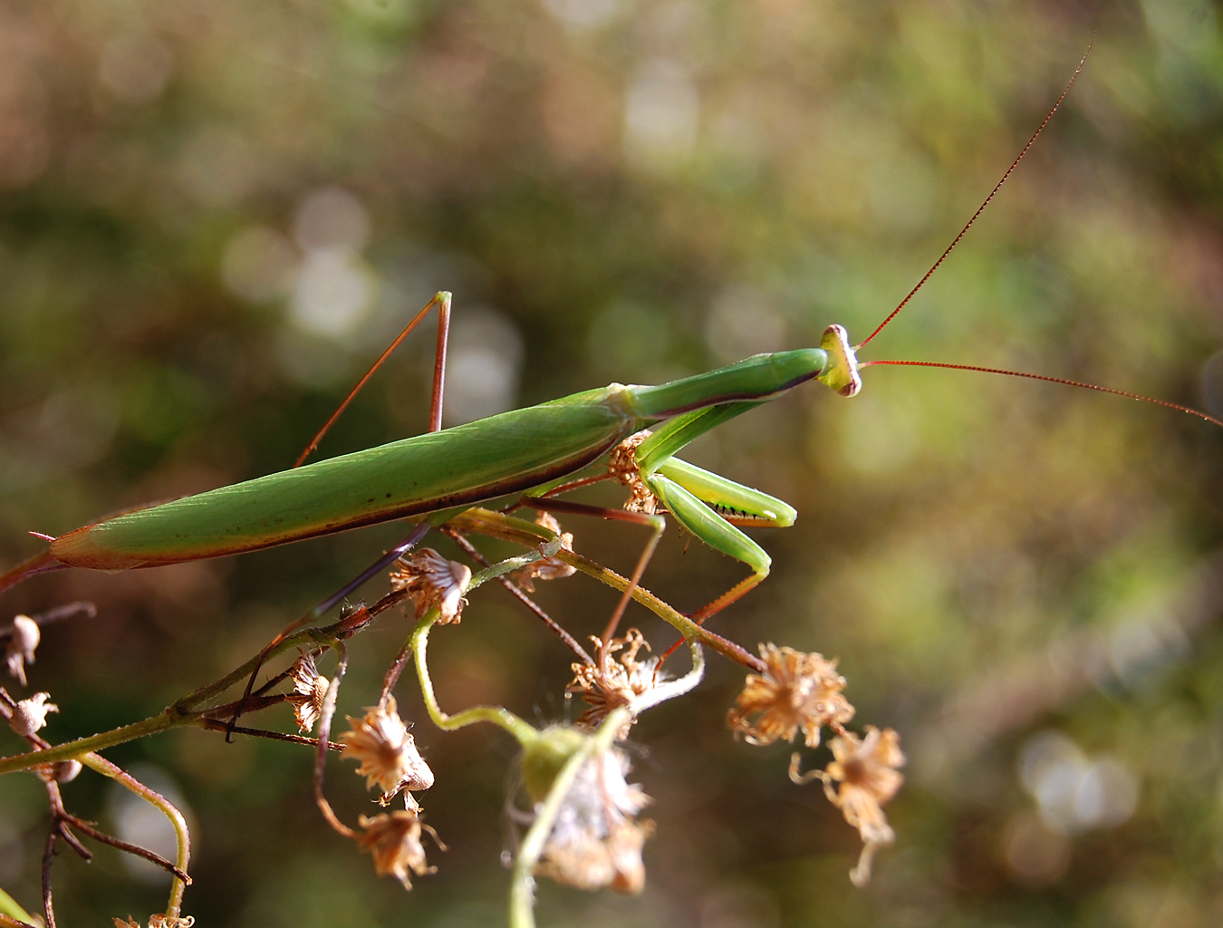 Mantis religiosa